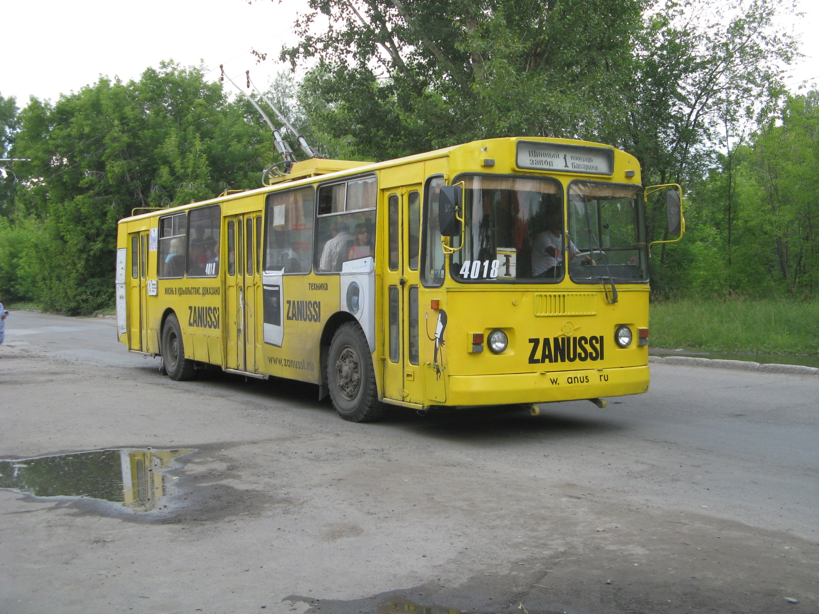 ЗиУ-682, №4018